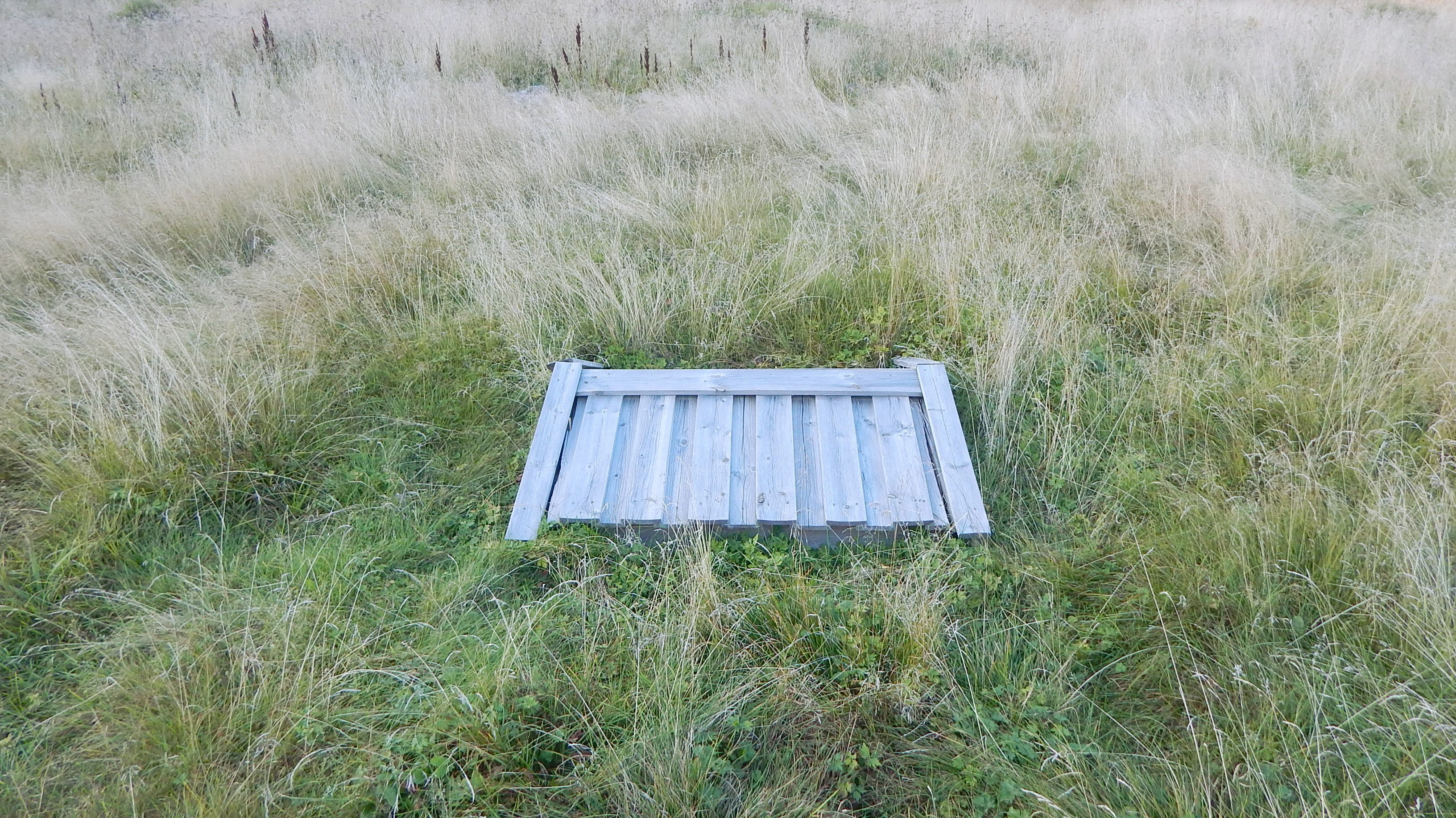 Brønn i Terningen skanse